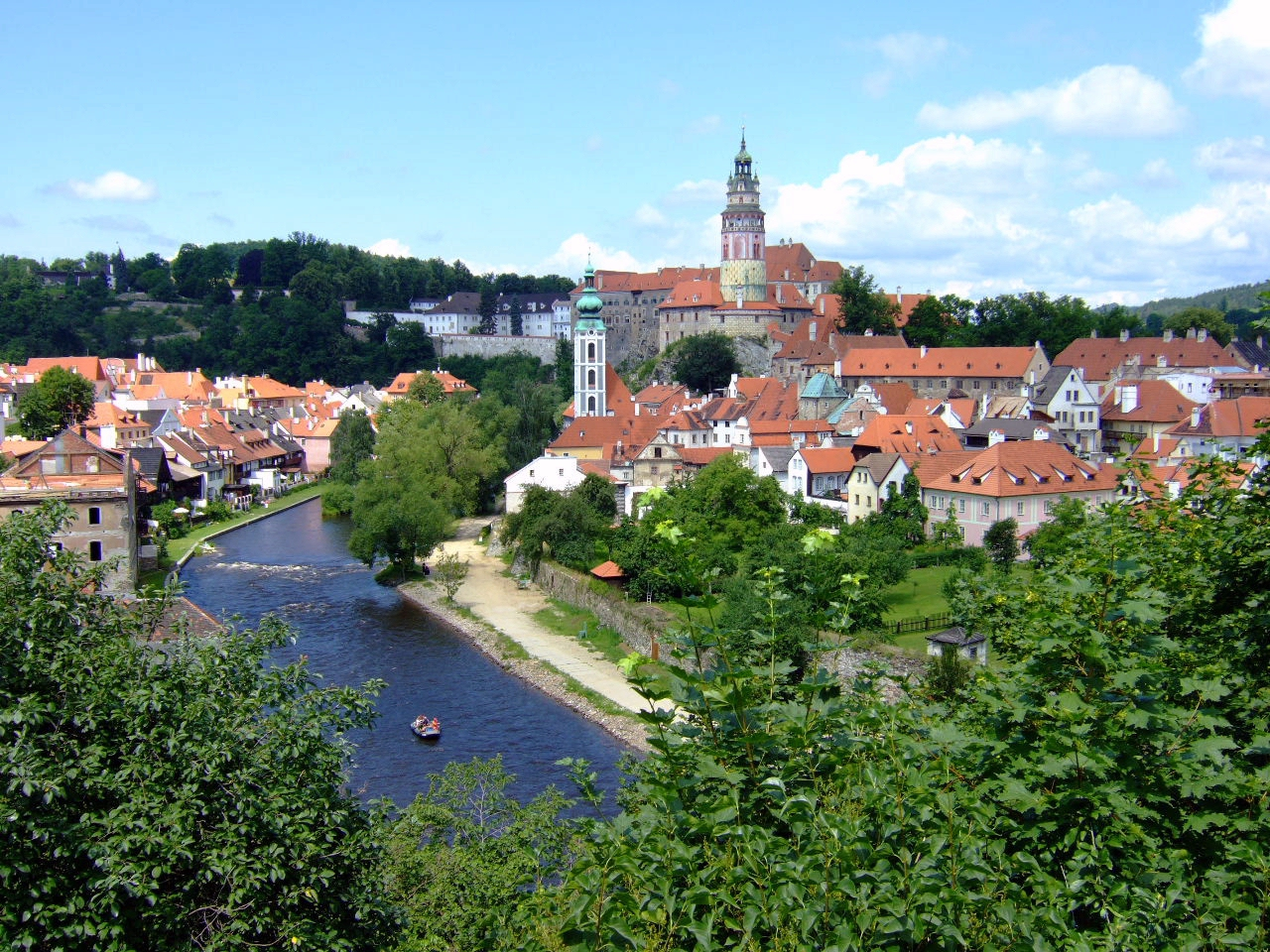 Moldau in Český Krumlov Aufnahme: 10. Juli 2006 Url